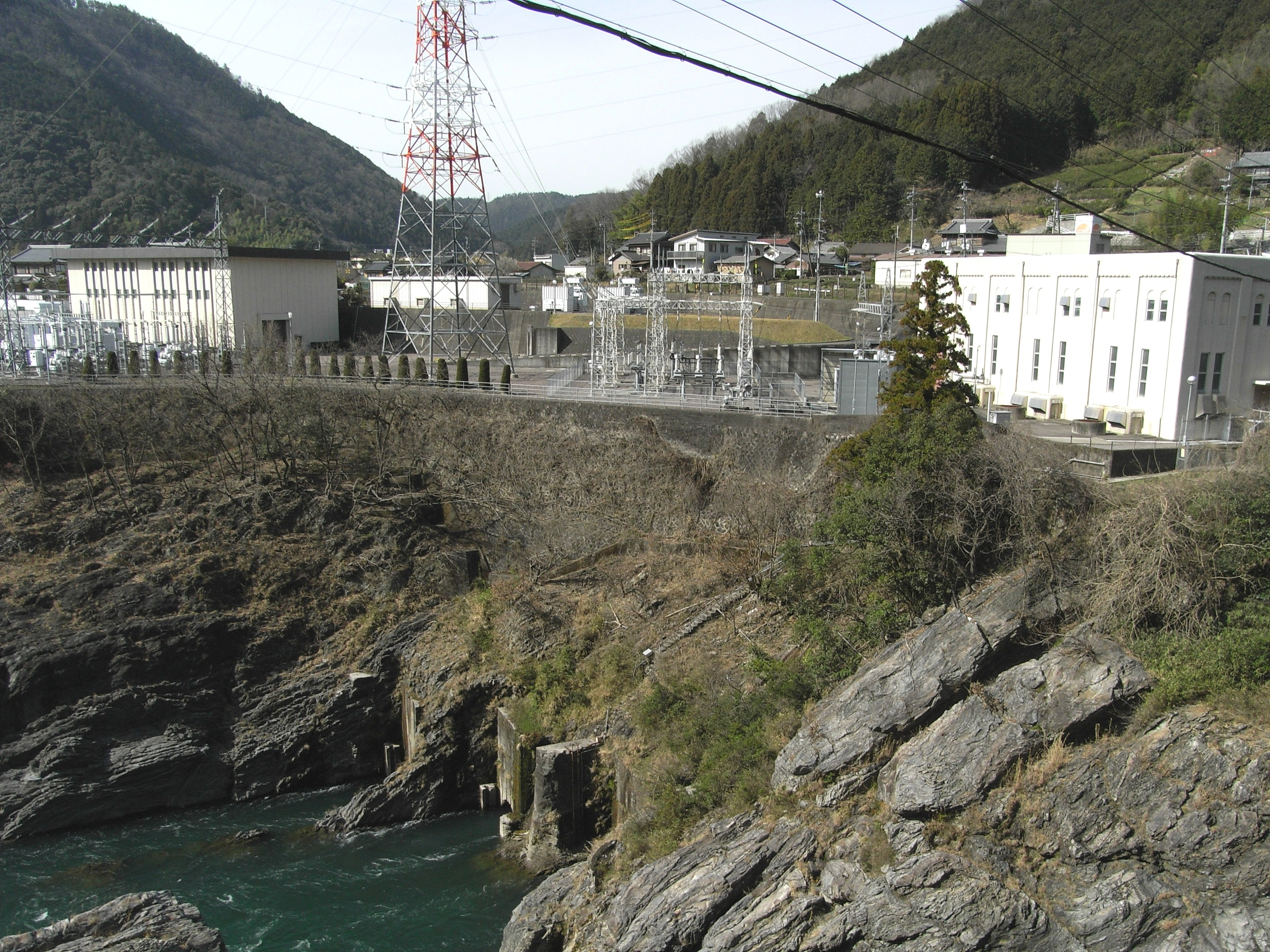 Dam